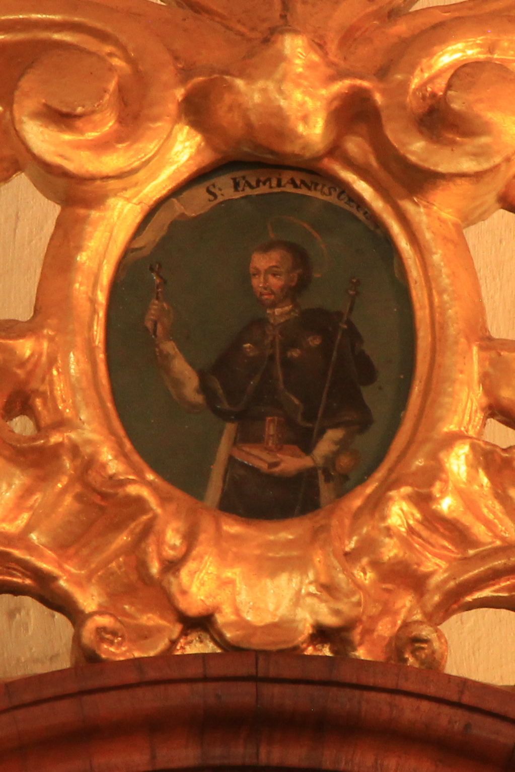 Bildnis hl. Famianus in der Sakristei im Stift Heiligenkreuz dargestellt, zu Famian siehe Acta Sanctorum zum 8. August, S. 391